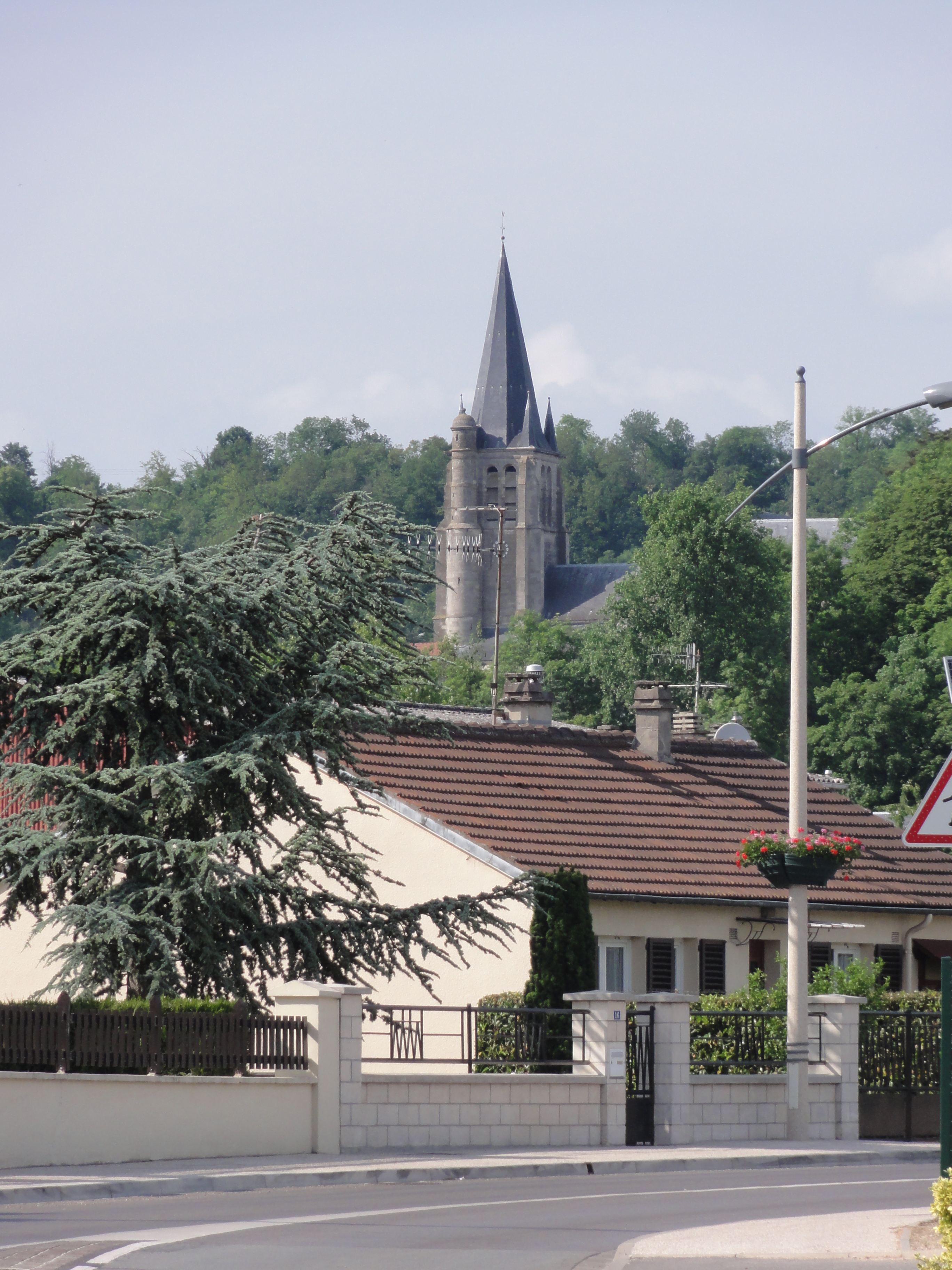 Bucy-le-Long (Aisne) Église Saint-Martin This building is indexed in the Base Mérimée, a database of architectural heritage maintained by the French Ministry of Culture, under the references PA00115566 and classé .